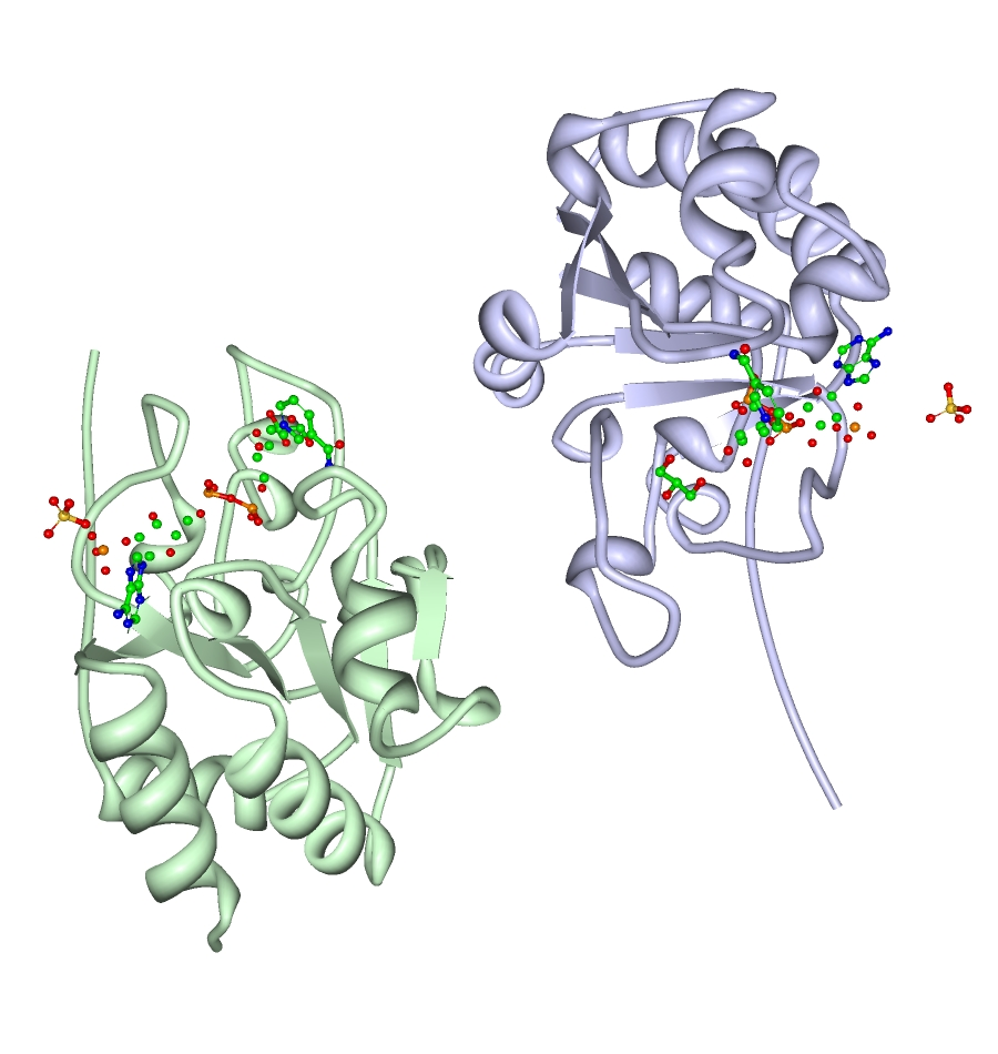 Imagen 3D de la NAD(P)+ transhidrogenasa creada a partir del ProteinWorkshop.